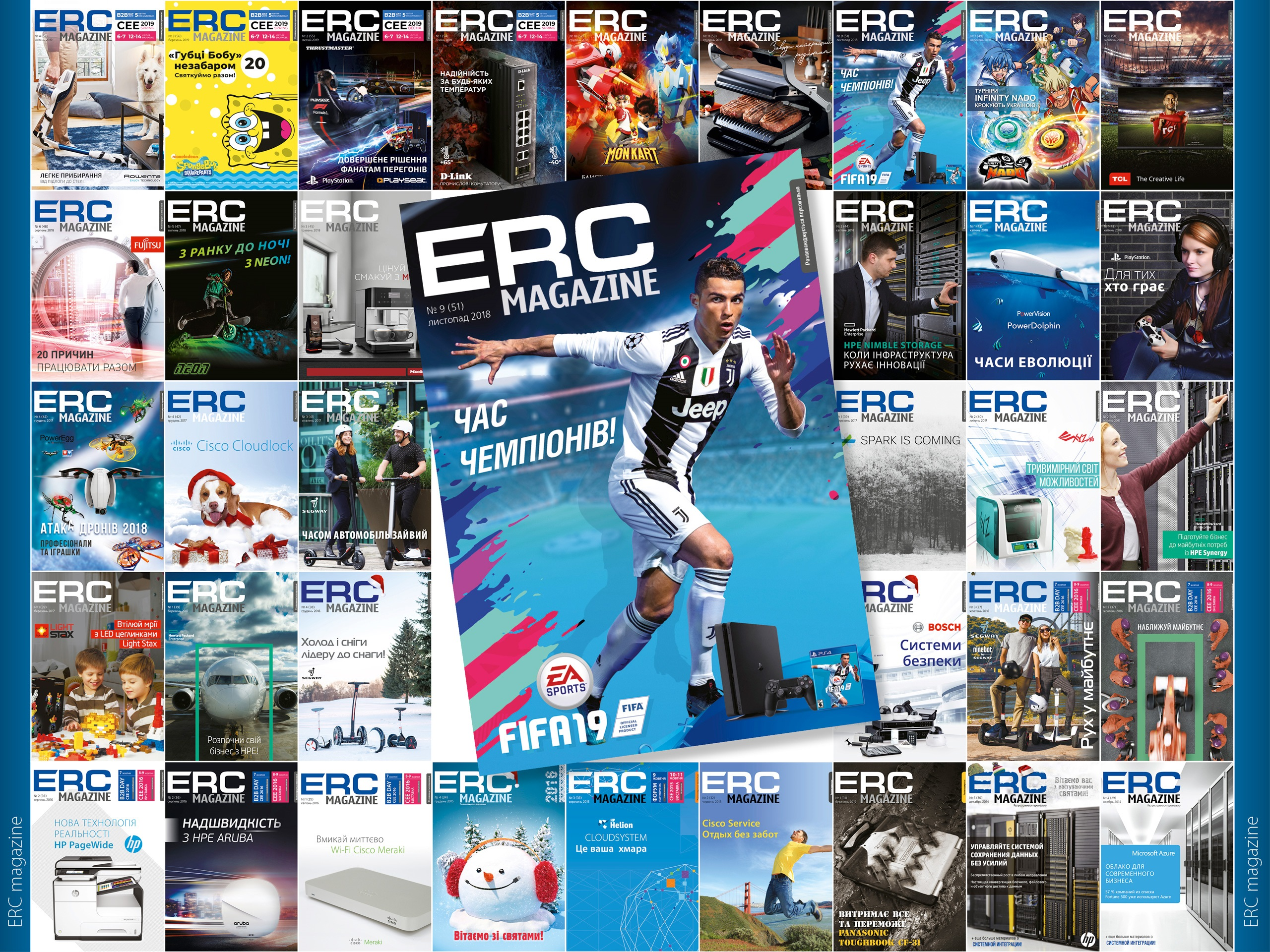 Колаж обкладинок ERC Magazine